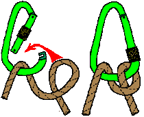 unite 2 immagini ([1] [2]